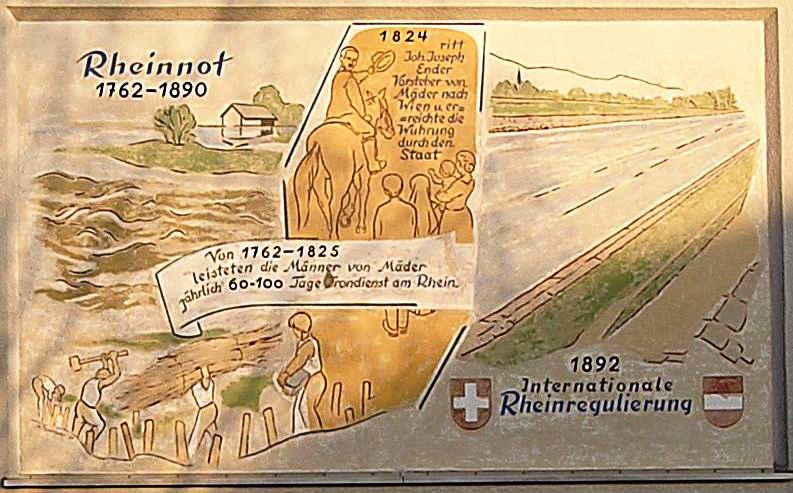 Gemeindeamt Mäder in Vorarlberg